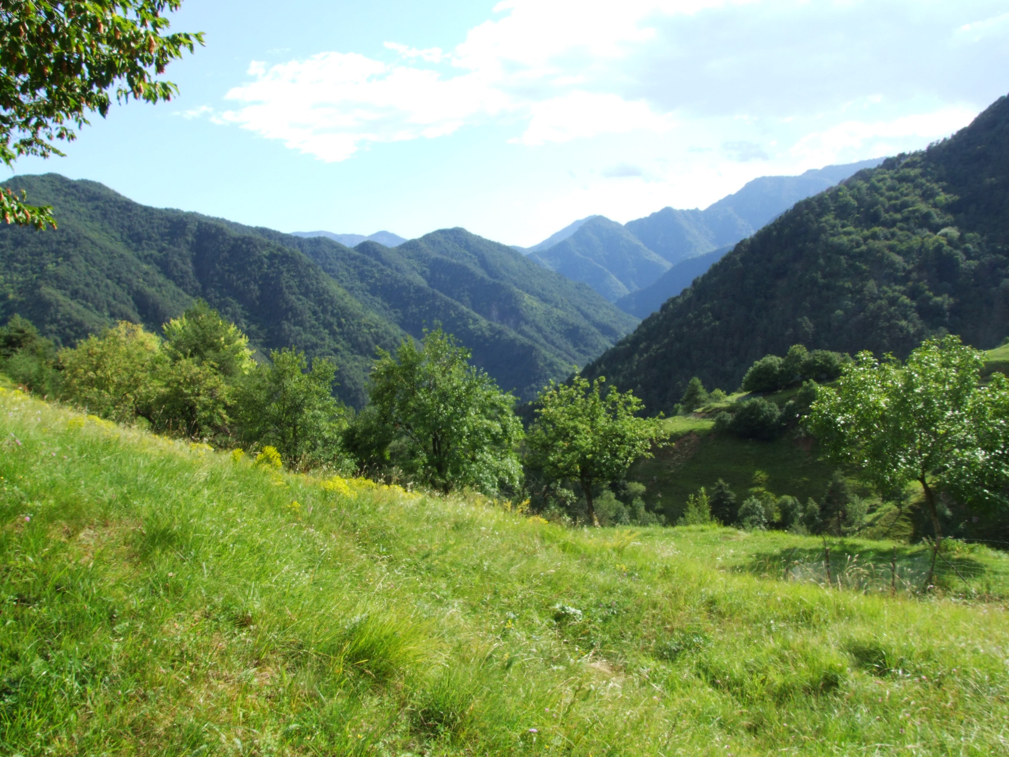 Valle del Droanello in Valvestino